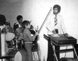 1976 - Nasrat´s erste Radio Aufnahme